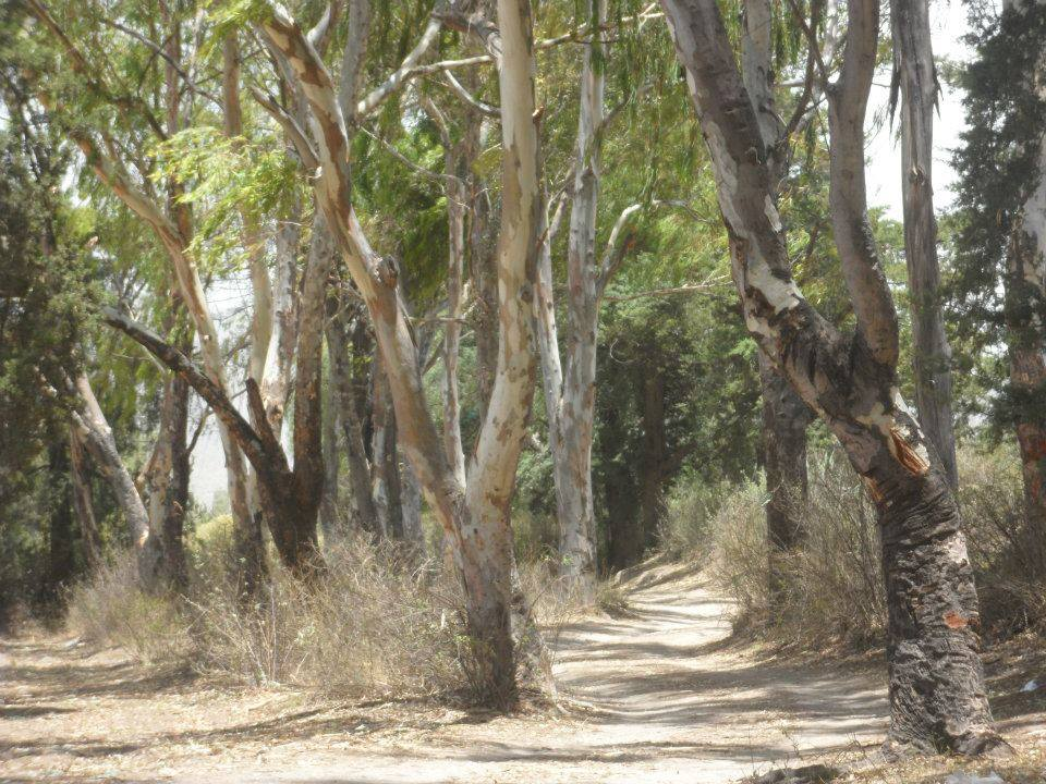 Paraje de las reservas naturales de Palmarito Tochapán. Fotografía Jeshua Geraldi © D.R.